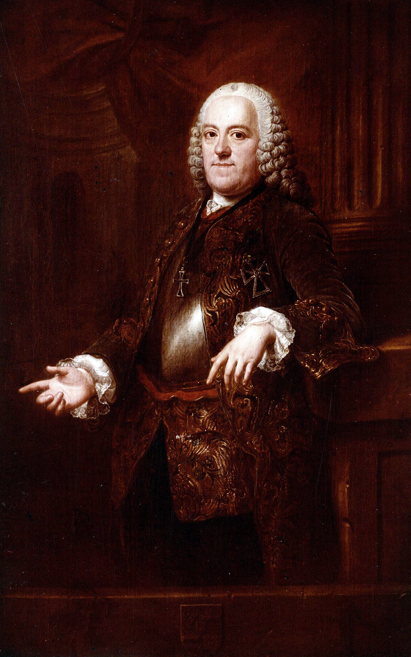 Frederik Hendrik baron van Wassenaer (1701-1771), Heer van de beide Katwijken, 't Zandt, Valkenburg, Rijnsaterwoude, Raephorst en IJzendoorn, was een Nederlandse jurist, politicus en lid van de regentenklasse.